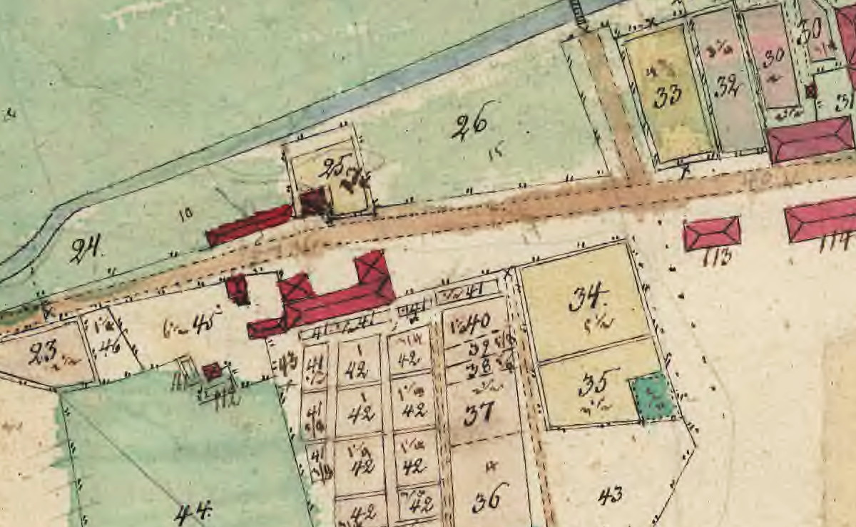 Karta över del av Ulriksdals slottsområde (väster om slottsstallet) visande fasanbyggnaden och klockställarens bostad (24, 25, 26) samt fasangårdens åkermark (42)